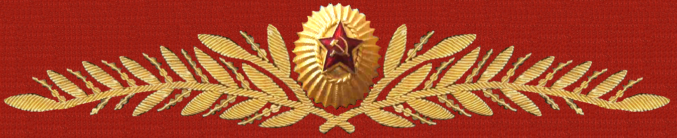 Шитье ген 1954 общ